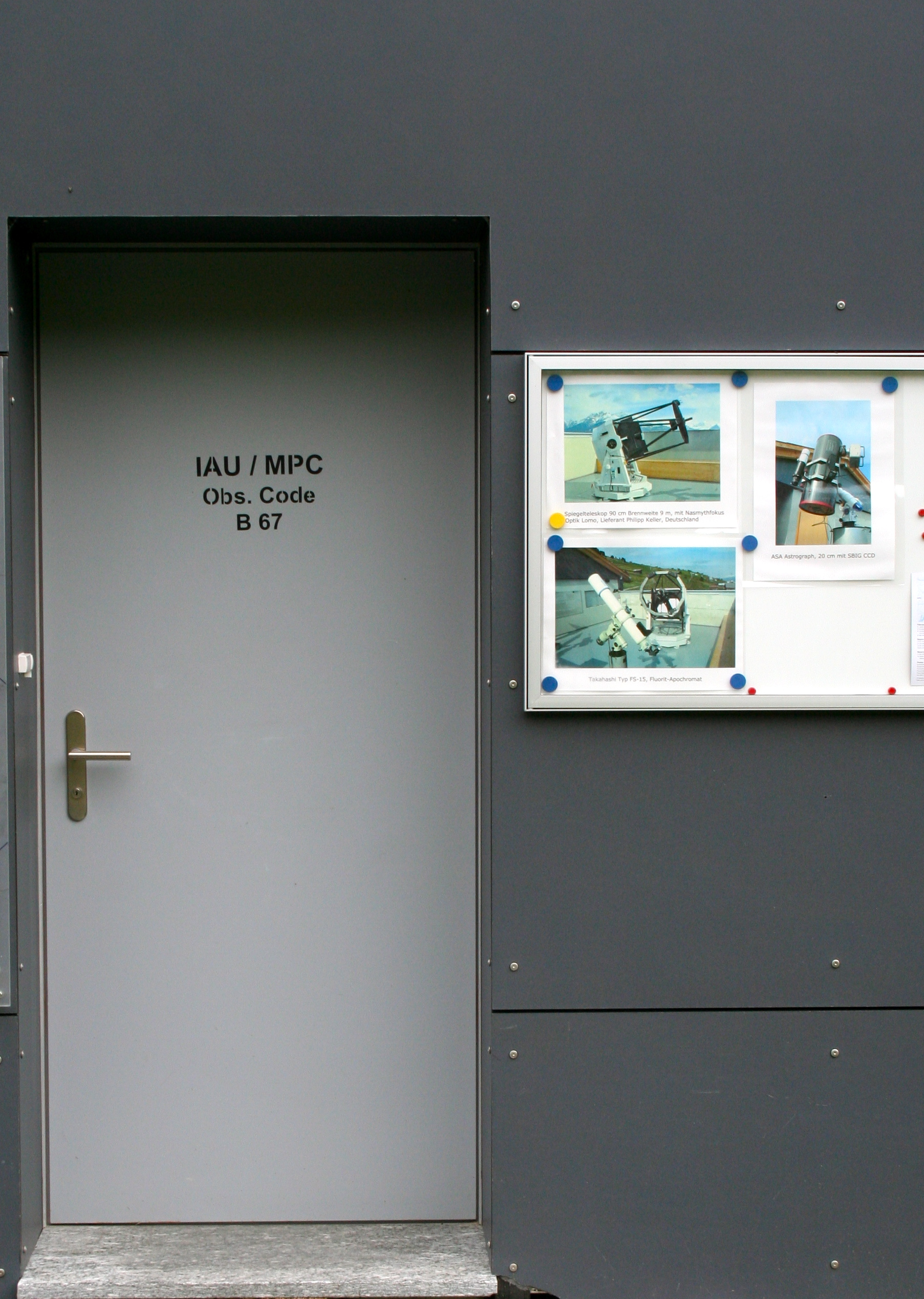 Sternwarte Mirasteilas Eingangstür mit NASA-Zulassung